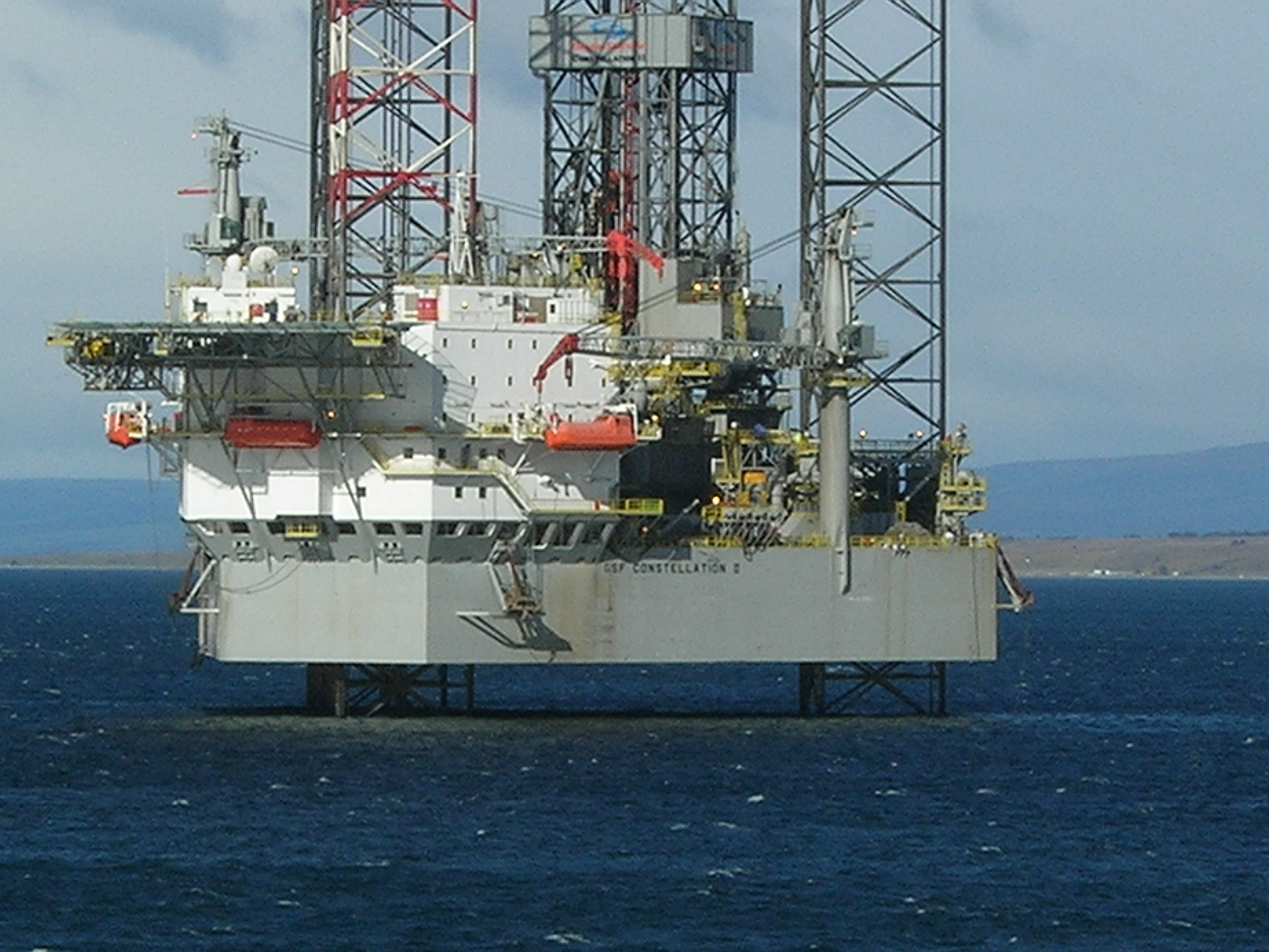 Plate-forme pétrolère GSF Constellation II au large de Punta Arenas (Chili )